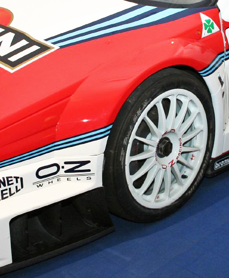 Cerchio OZ dell' Alfa Romeo 155 V6 TI DTM